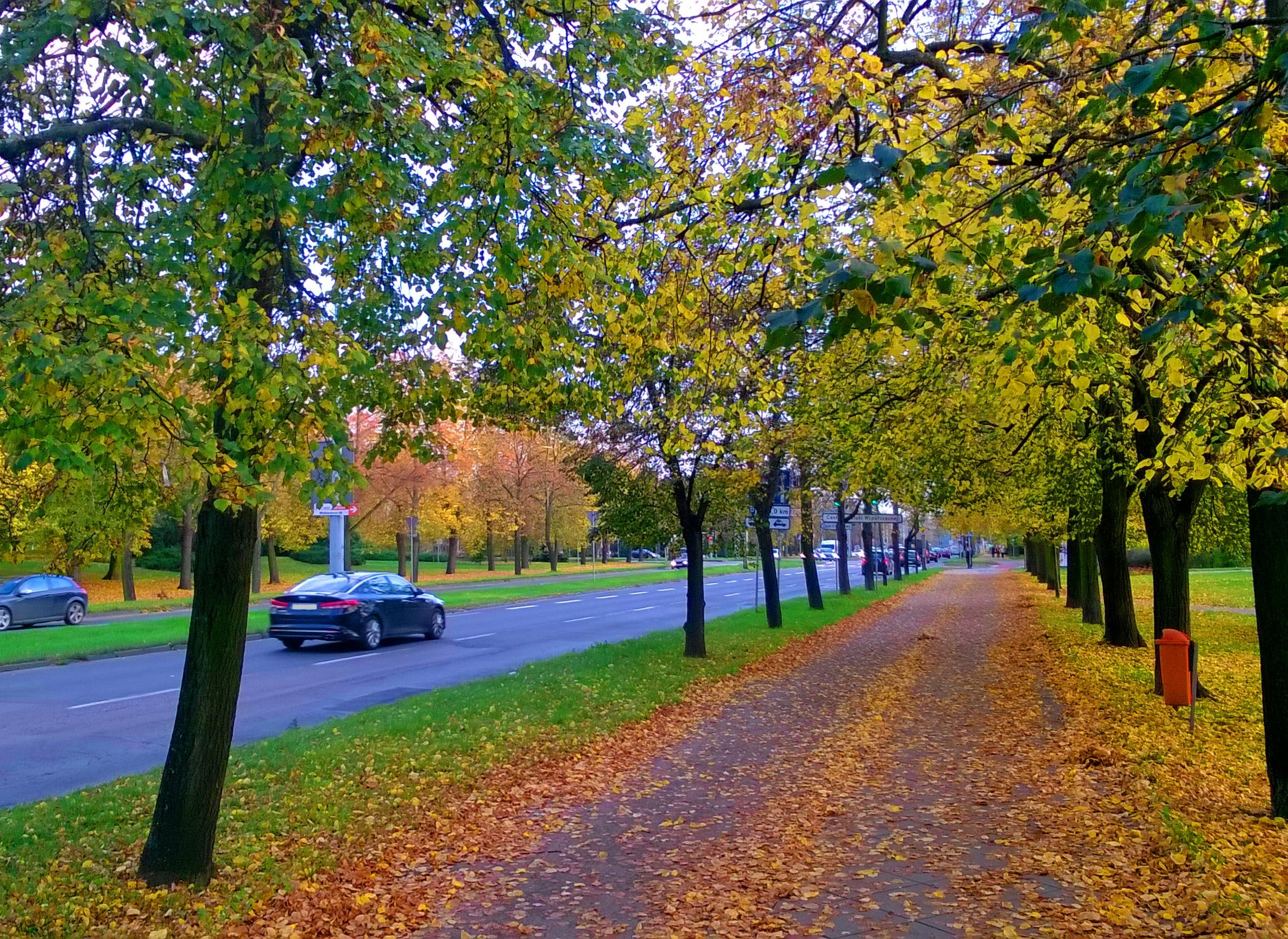 Aleja Jana Pawła II w Toruniu, jesień 2017